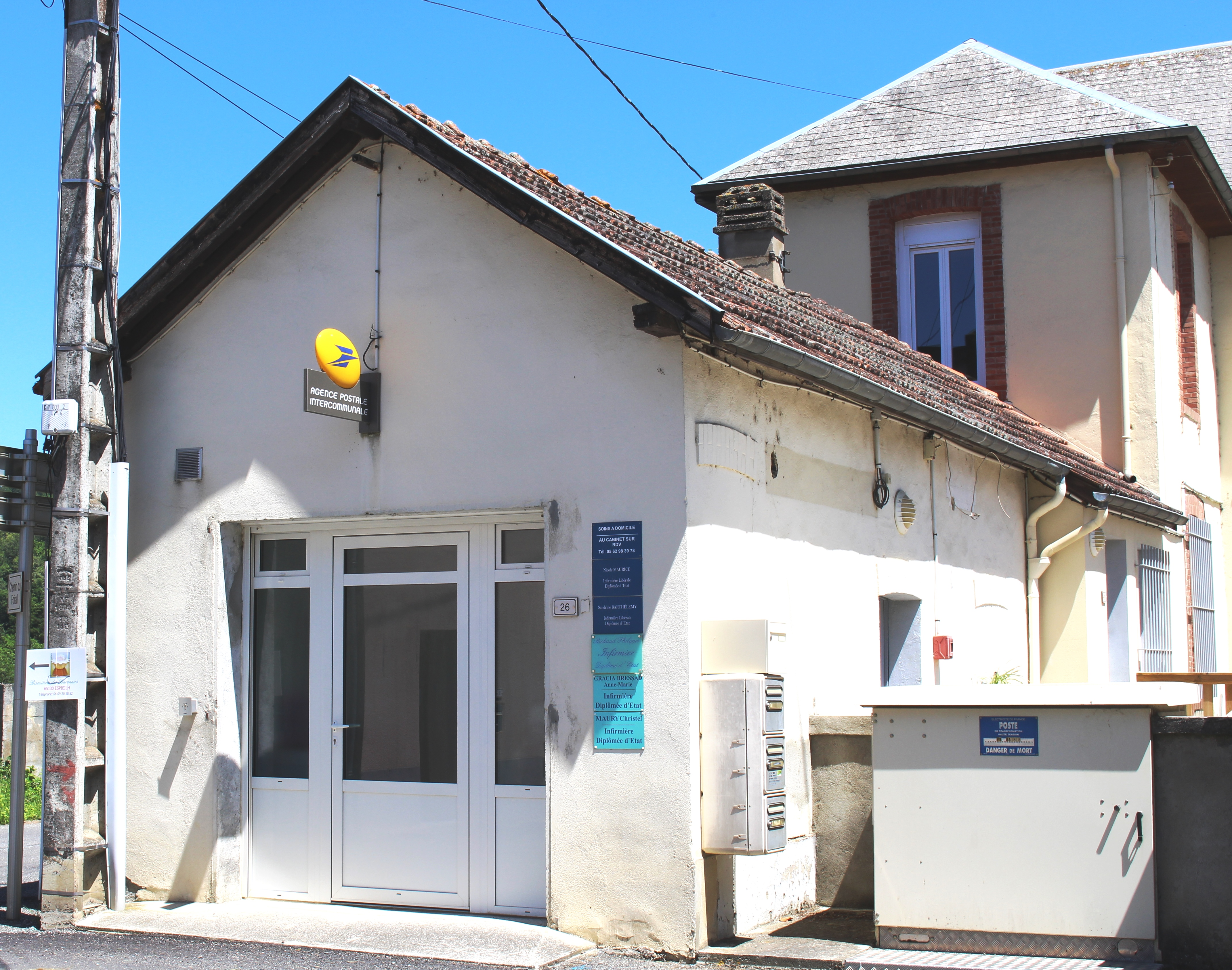 Poste de Bourg-de-Bigorre (Hautes-Pyrénées)